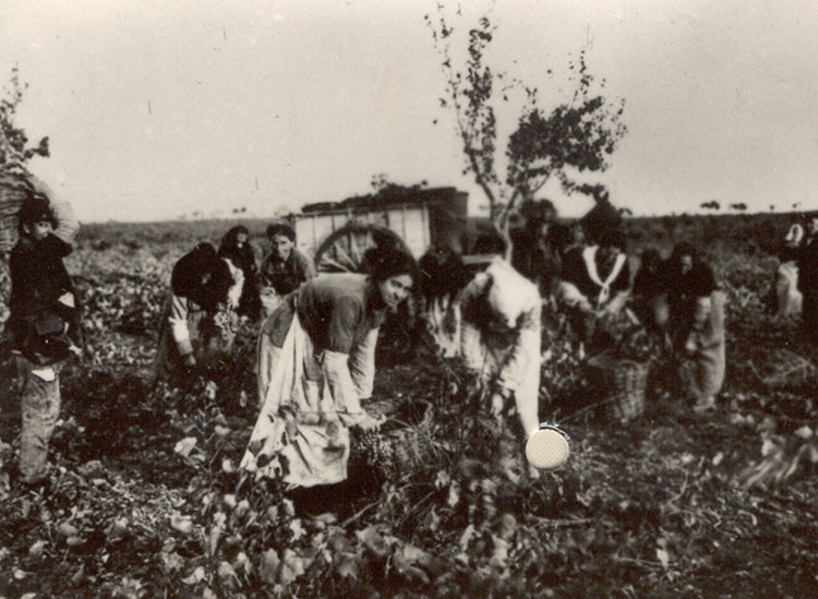 Vendimia - Valbuena de Duero (Valladolid) - Cuaderno. Álbum de Valladolid - Fotografía 60 x 42 B/N